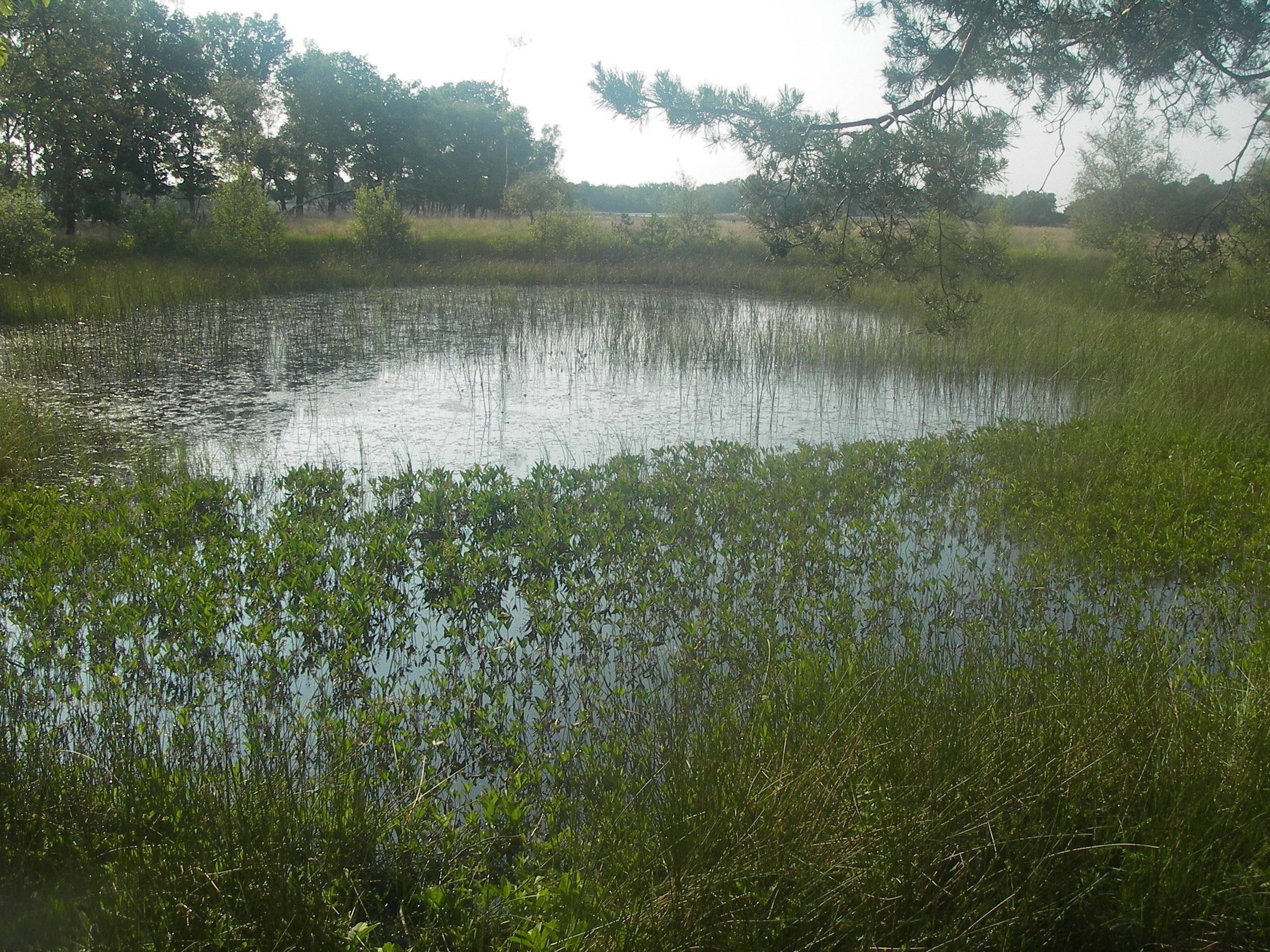 Het Rond Vennetje, een voorbeeld van een pingoruïne